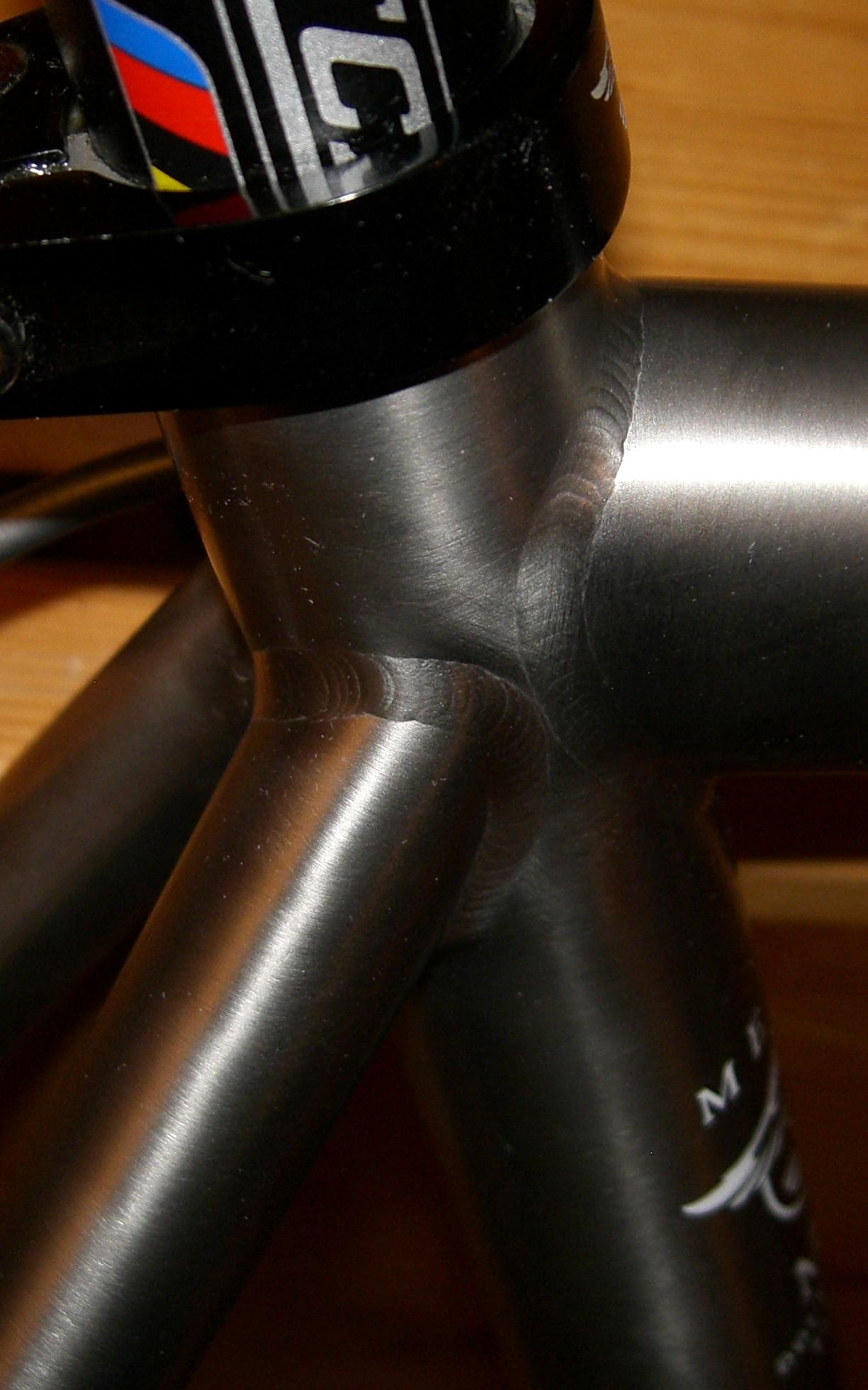 Titanium welds